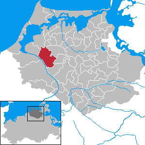 Ahrenshagen-Daskow in Mecklenburg-Vorpommern - District Nordvorpommern